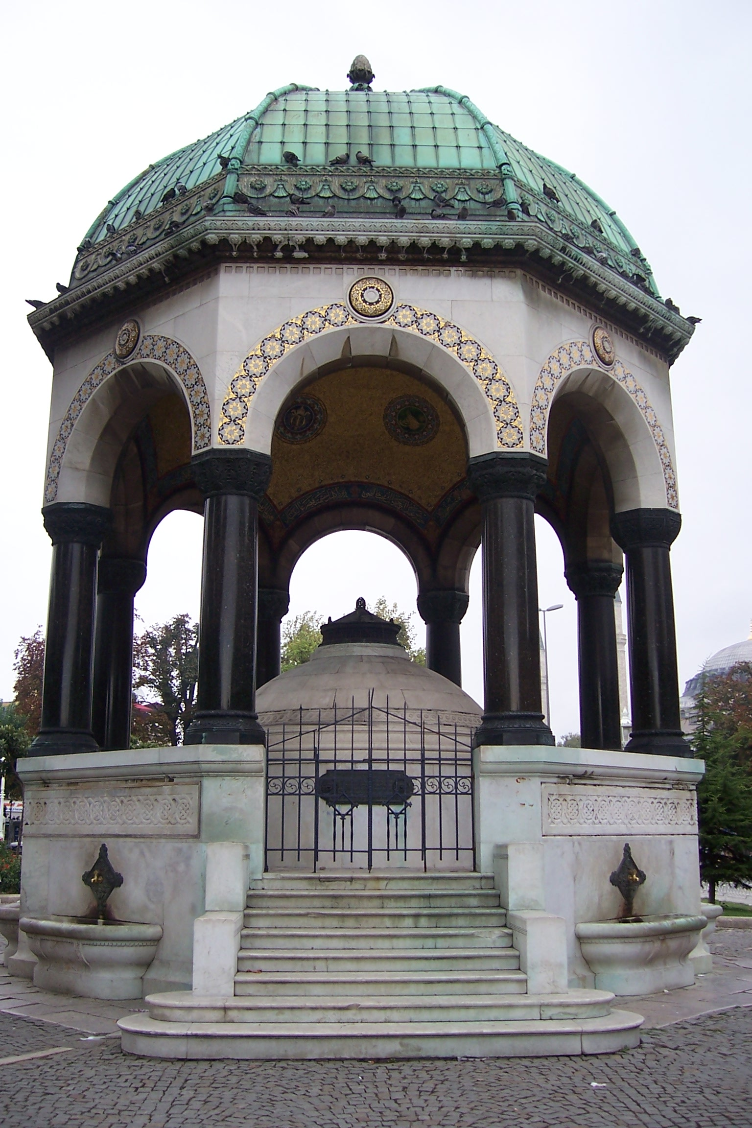 Alman Çeşmesi, Sultanahmet, Istanbul, Turkey.